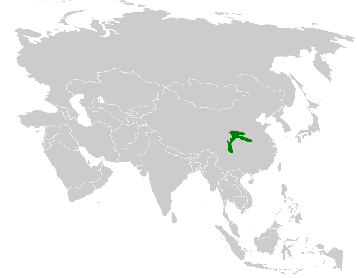 Aegithalos fuliginosus distribution map, based on